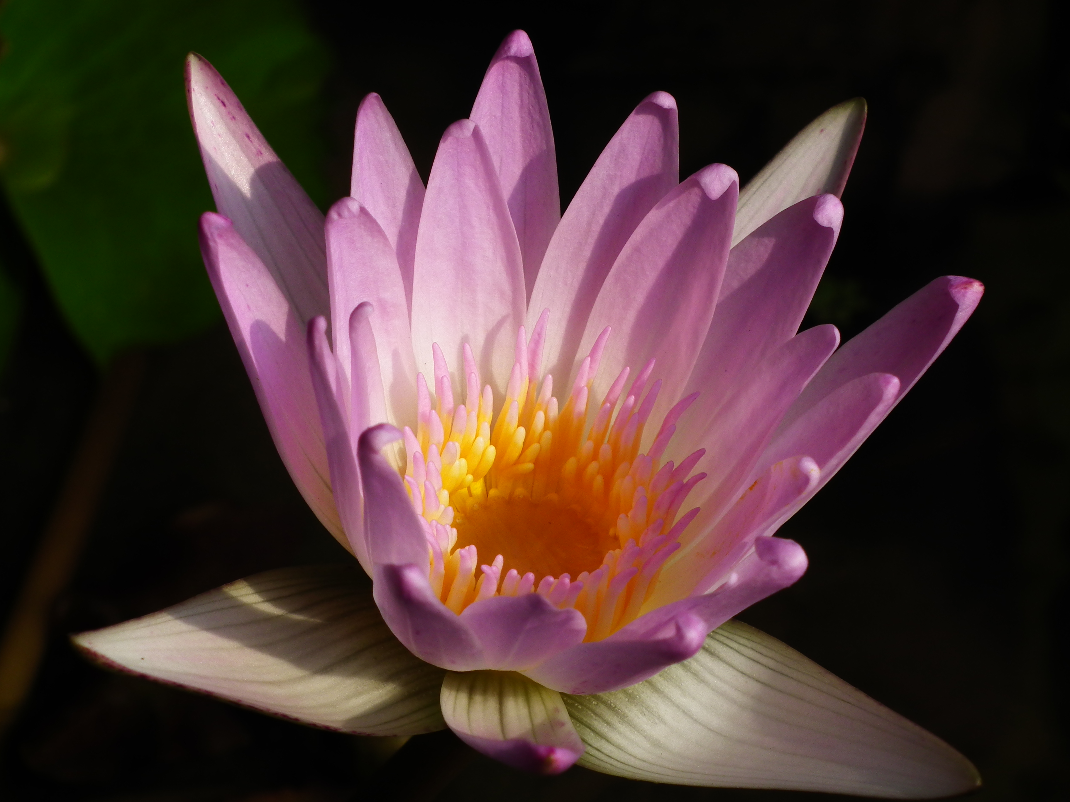 界： 植物界 Plantae 門： 被子植物門 Magnoliophyta (未分級) 被子植物分支 angiosperms 目： 睡蓮目 Nymphaeales 科： 睡蓮科 Nymphaeaceae 屬： 睡蓮屬 Nymphaea 種： 睡蓮 Nymphaea tetragona